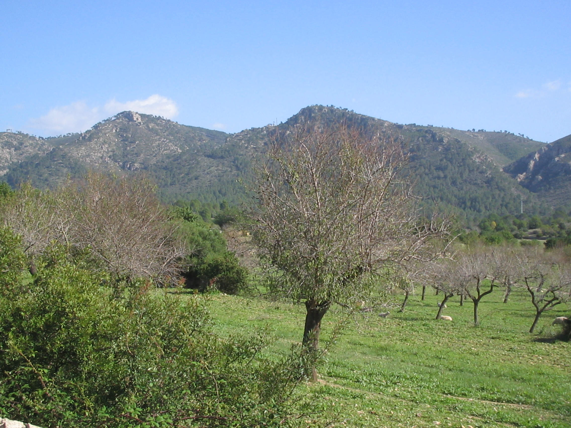 Montañas de los alrededores de Calviá en Mallorca.